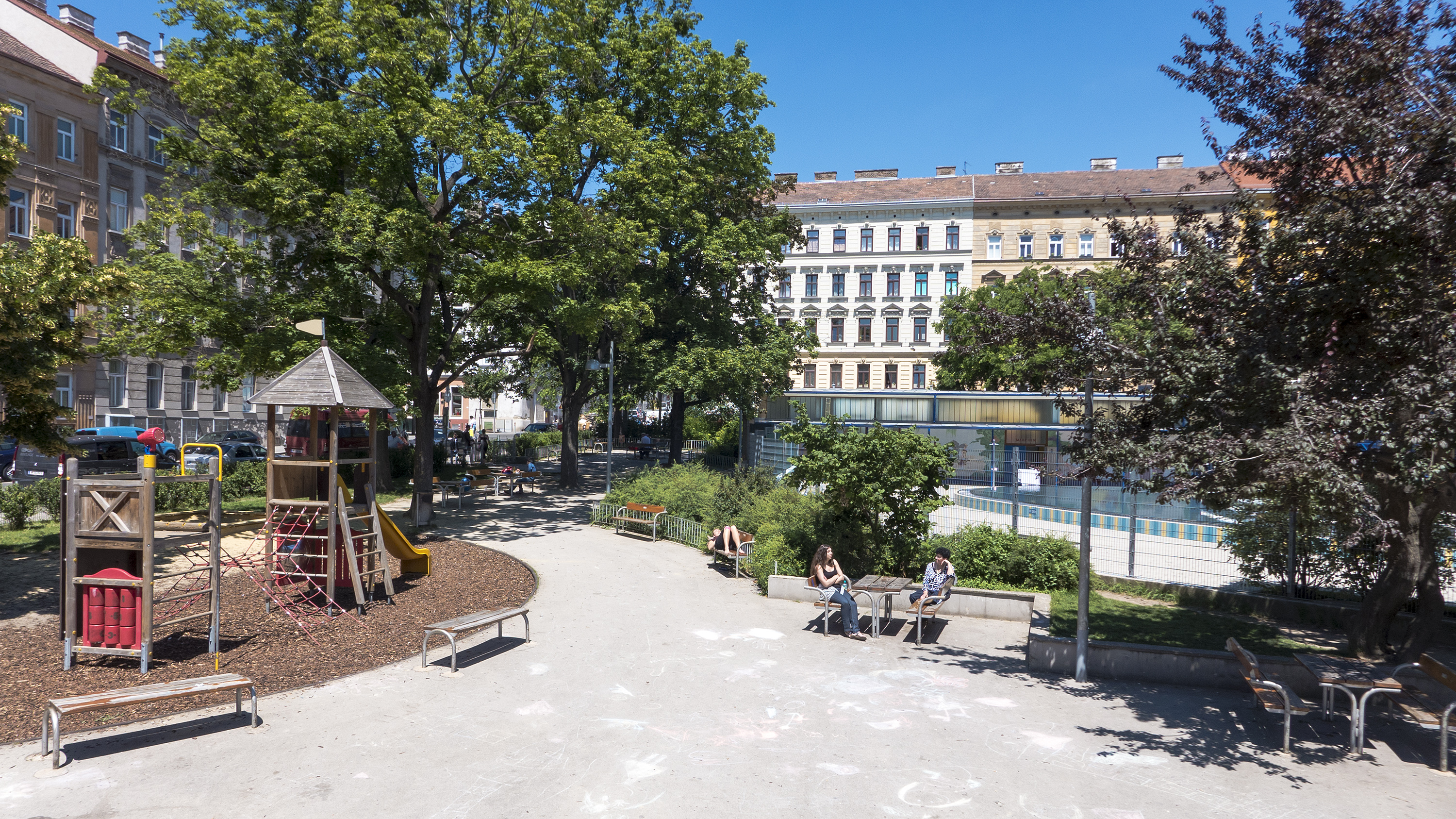 Reinlpark in Wien 14